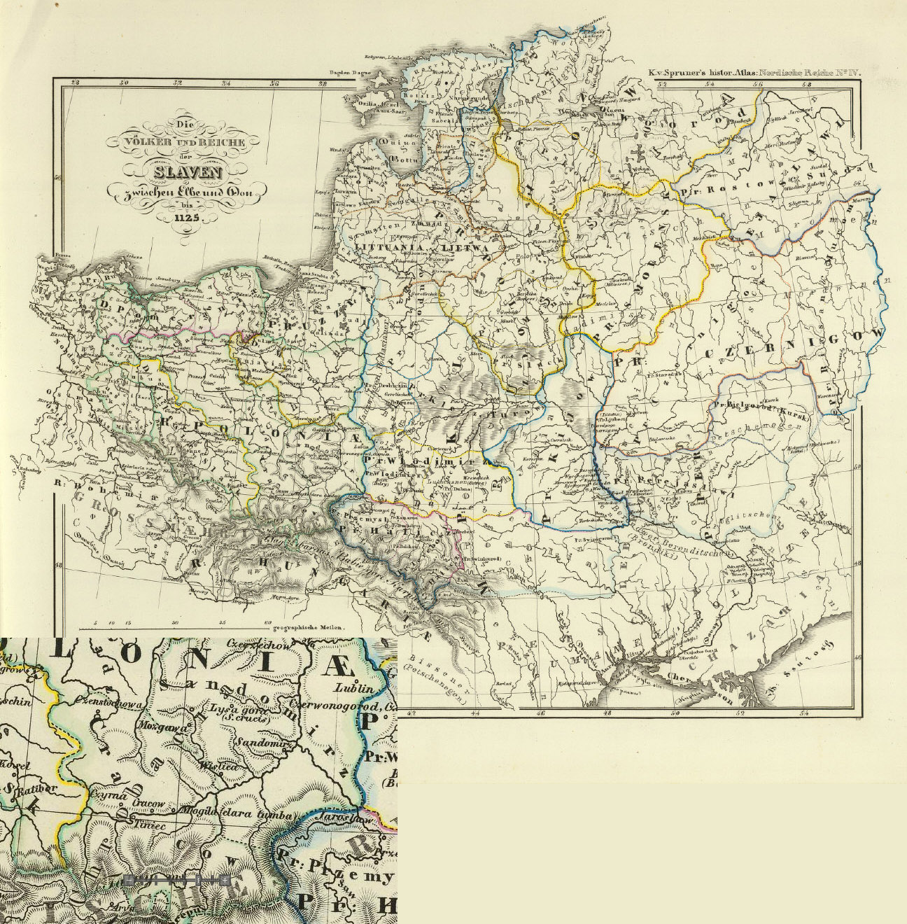 Die Volker und Reiche der Slaven zwischen Elbe und Don bis 1125. K.v. Spruner's histor. Atlas: Nordische Reiche No. IV. (Gotha: Justhus Perthes). Rev. 1855.